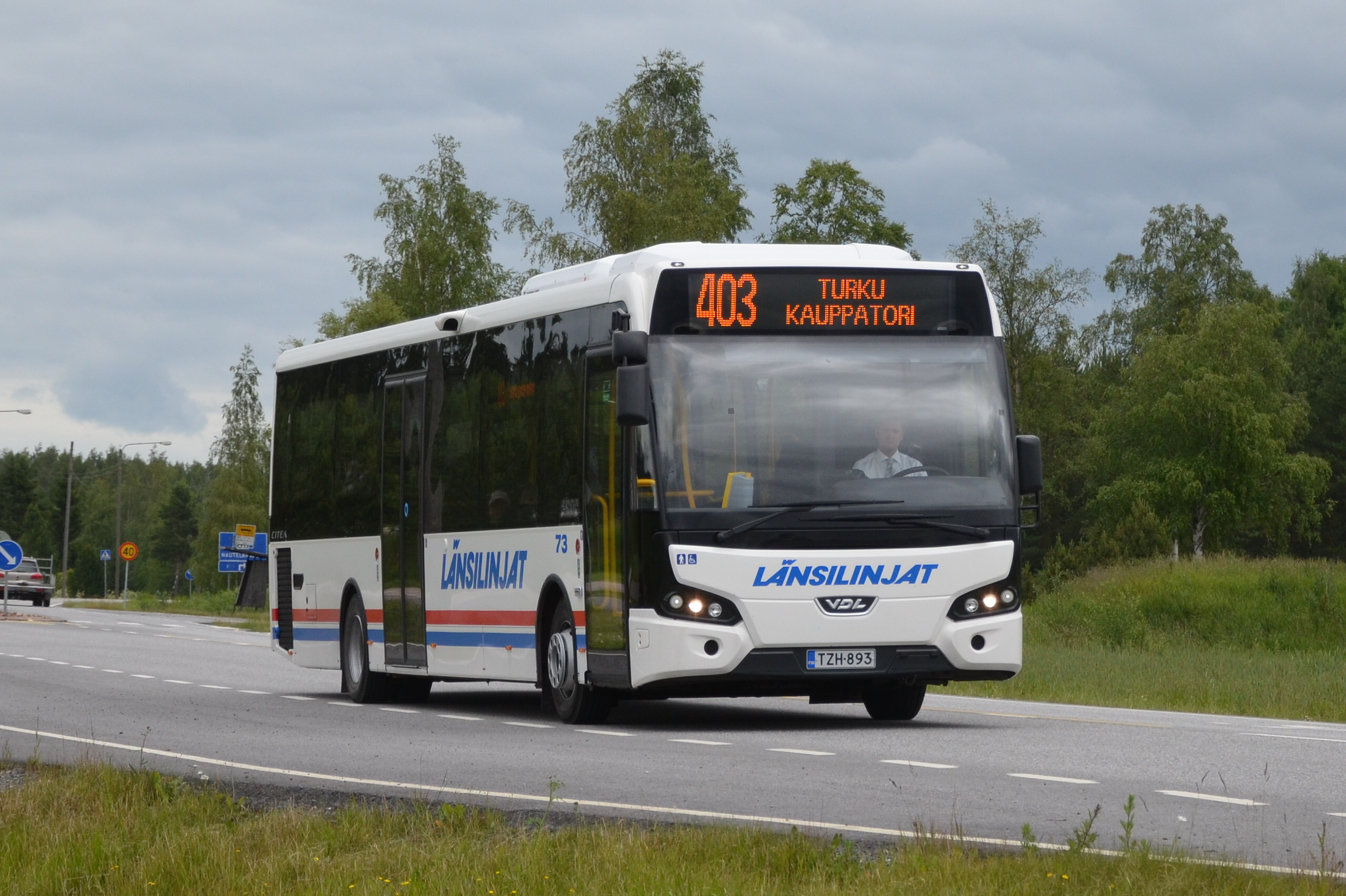 Länsilinjojen bussi Liedossa